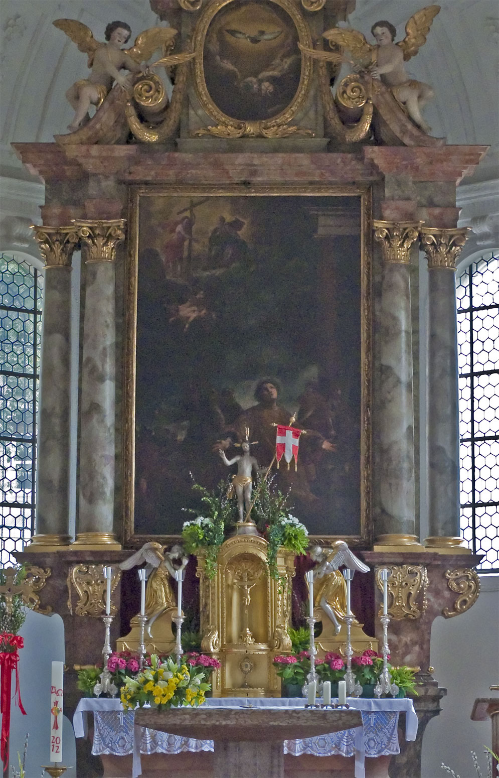 St. Stephan München Altar